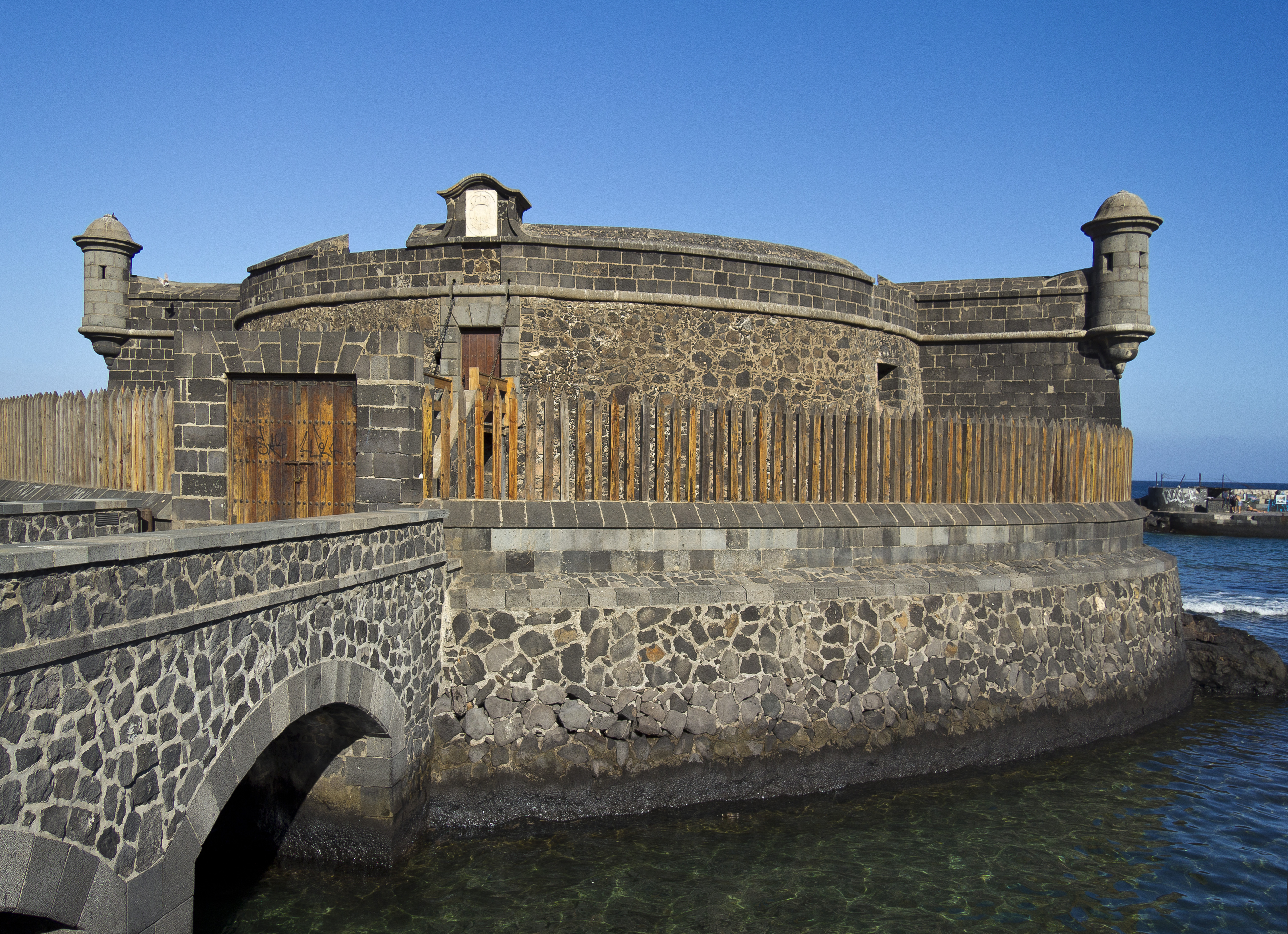 Das Castillo de San Juan Bautista (Castillo Negro) in Santa Cruz de Tenerife